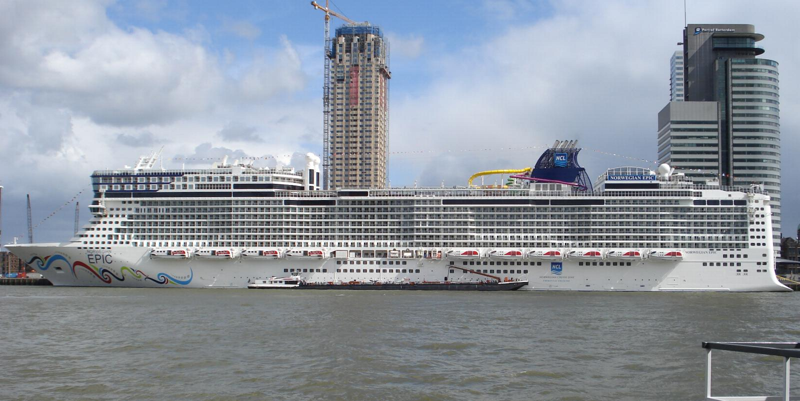 Bezoek cruiseschip Norwegian Epic aan Rotterdam, 19 juni 2010